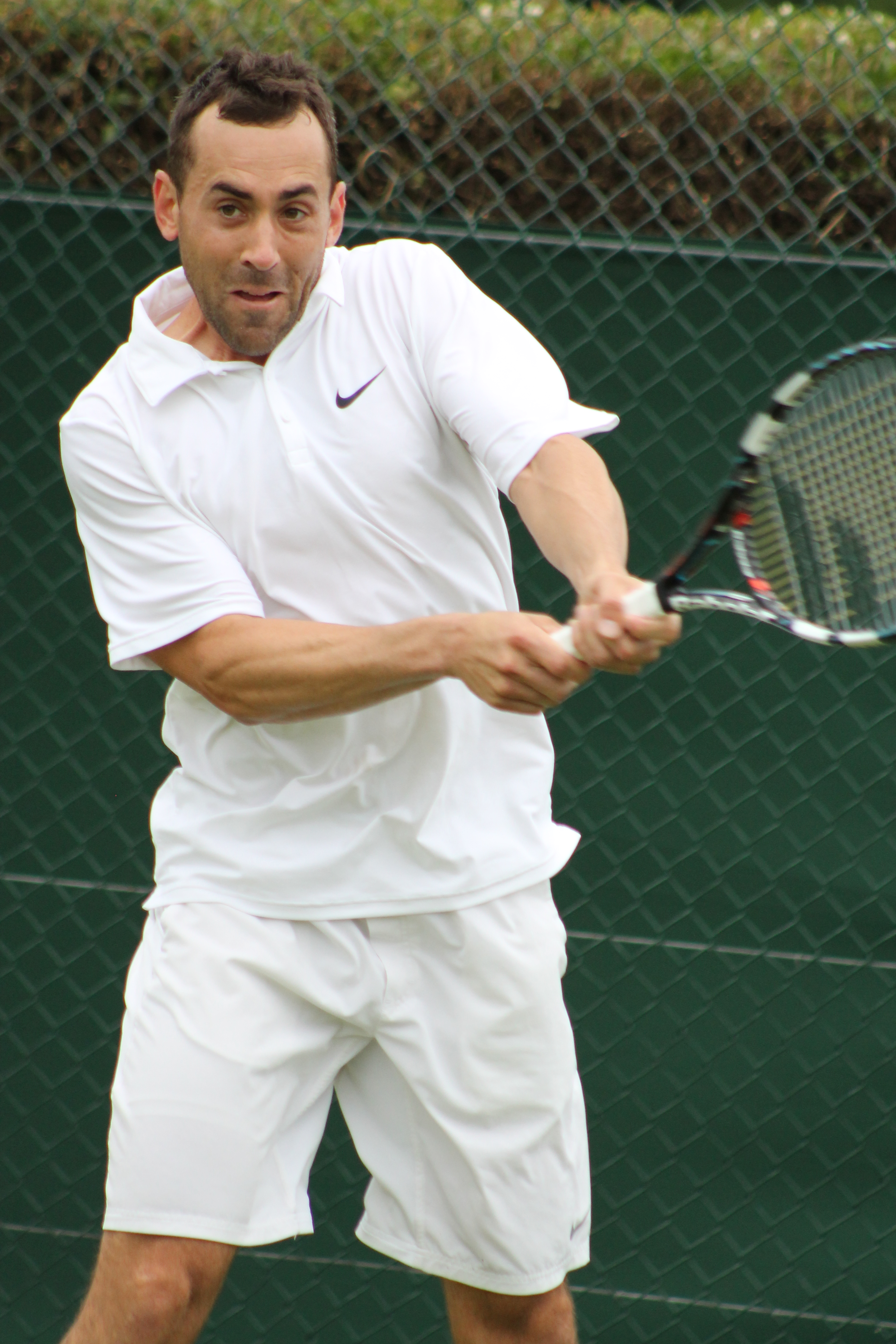 Reynolds WMQ14 (13)